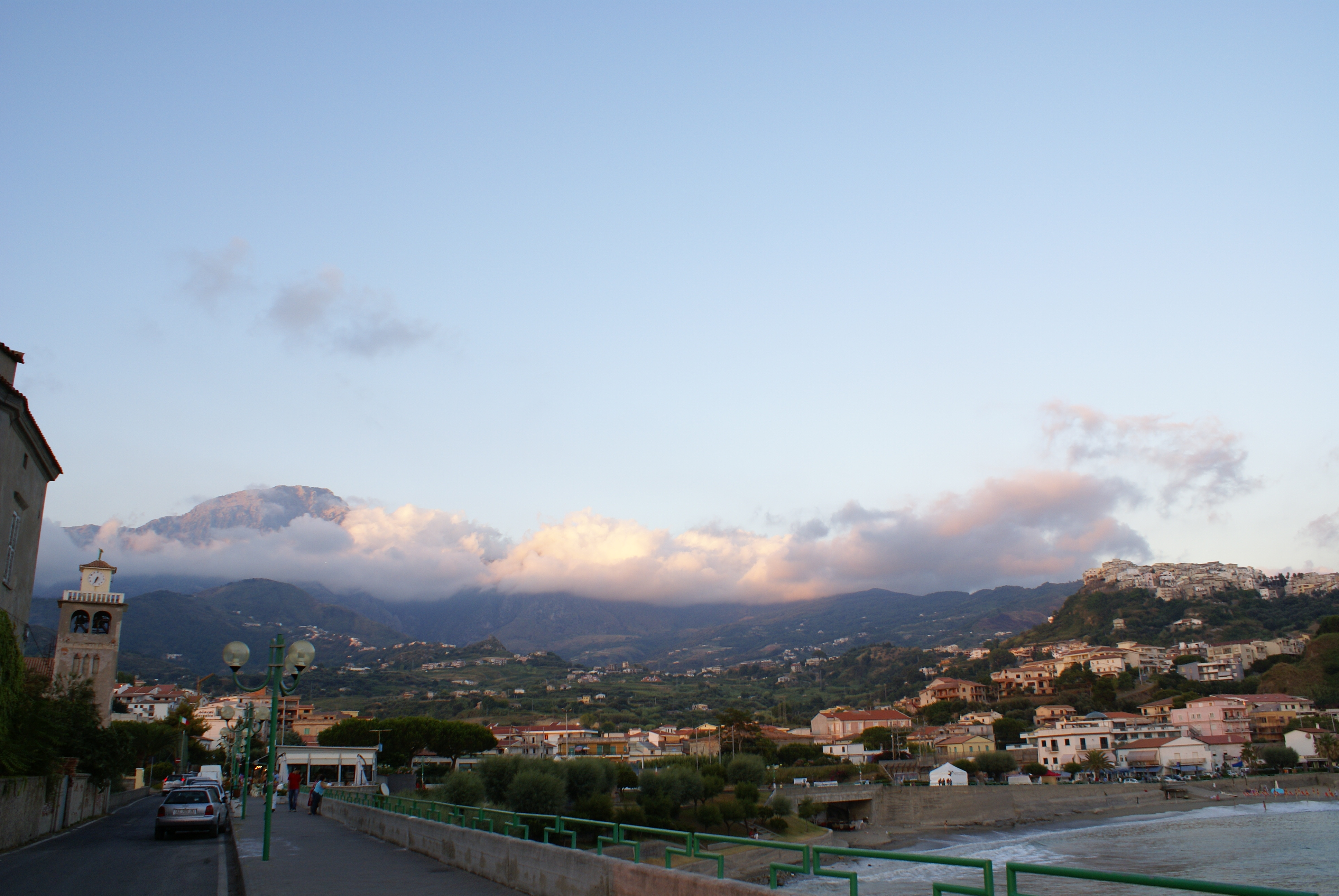 Belvedere Marittimo (Cs), luglio 2007. In alto a dx il paese antico arroccato sulla collina, in basso la zona del lungomare, a sinistra il campanile della chiesa nuova. La foto è Aki 01. Licenza parzialmente libera Creative Commons CC-BY-SA-2.5 (può essere riprodotta citando l'autore).